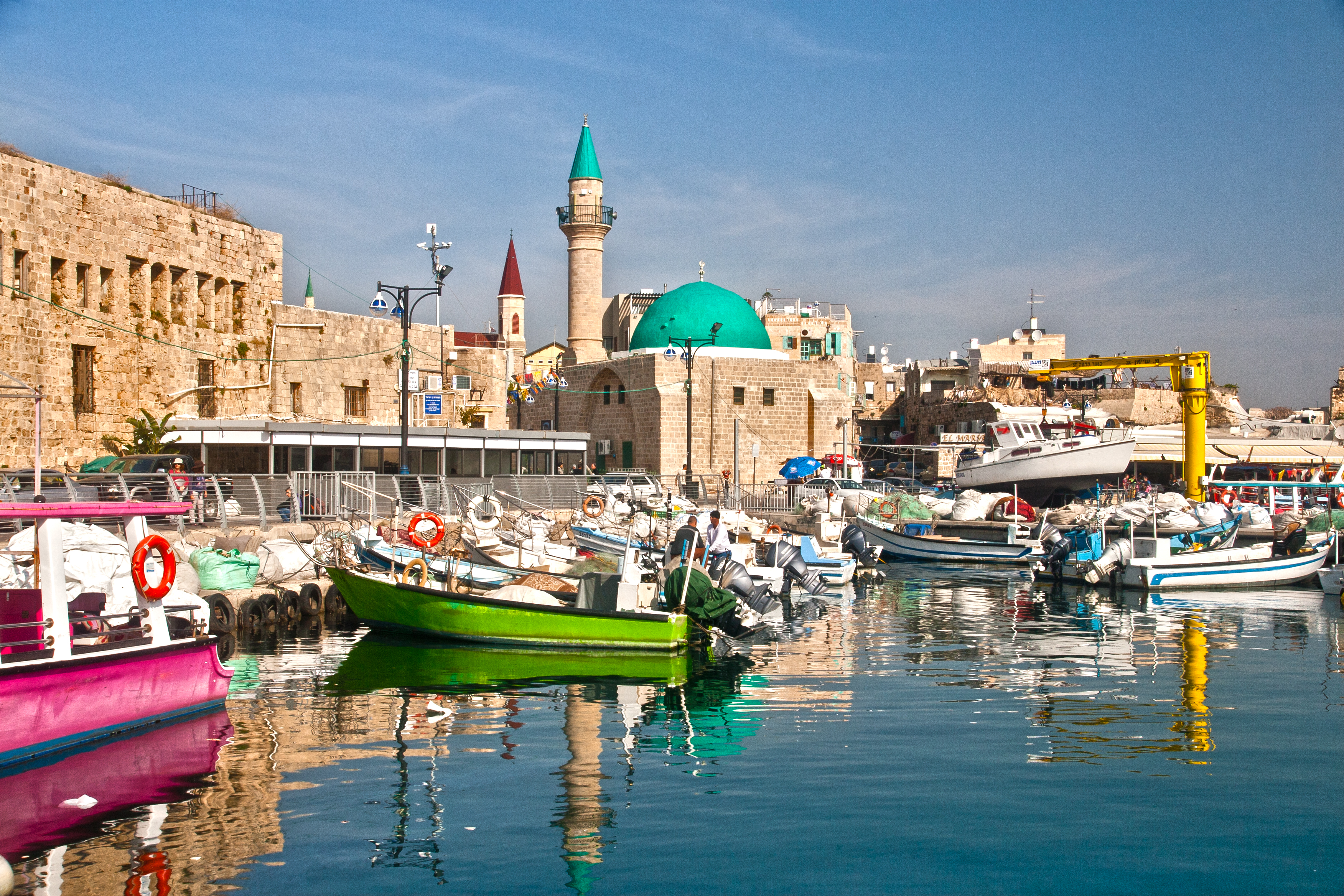 אמת עכו היא אמת מים שהובילה מים מאזור כברי אל העיר עכו. אמה זו ששרידיה נראים עד היום בתחומי העיר עכו ומצפון לה, נבנתה על ידי סולימאן פאשה, והייתה האמה השלישית ששירתה את העיר. קדמו לה אמה הלניסטית ואמה שהוקמה על ידי אחמד אל-ג'זאר ונהרסה בידי נפוליאון בשנת 1799.